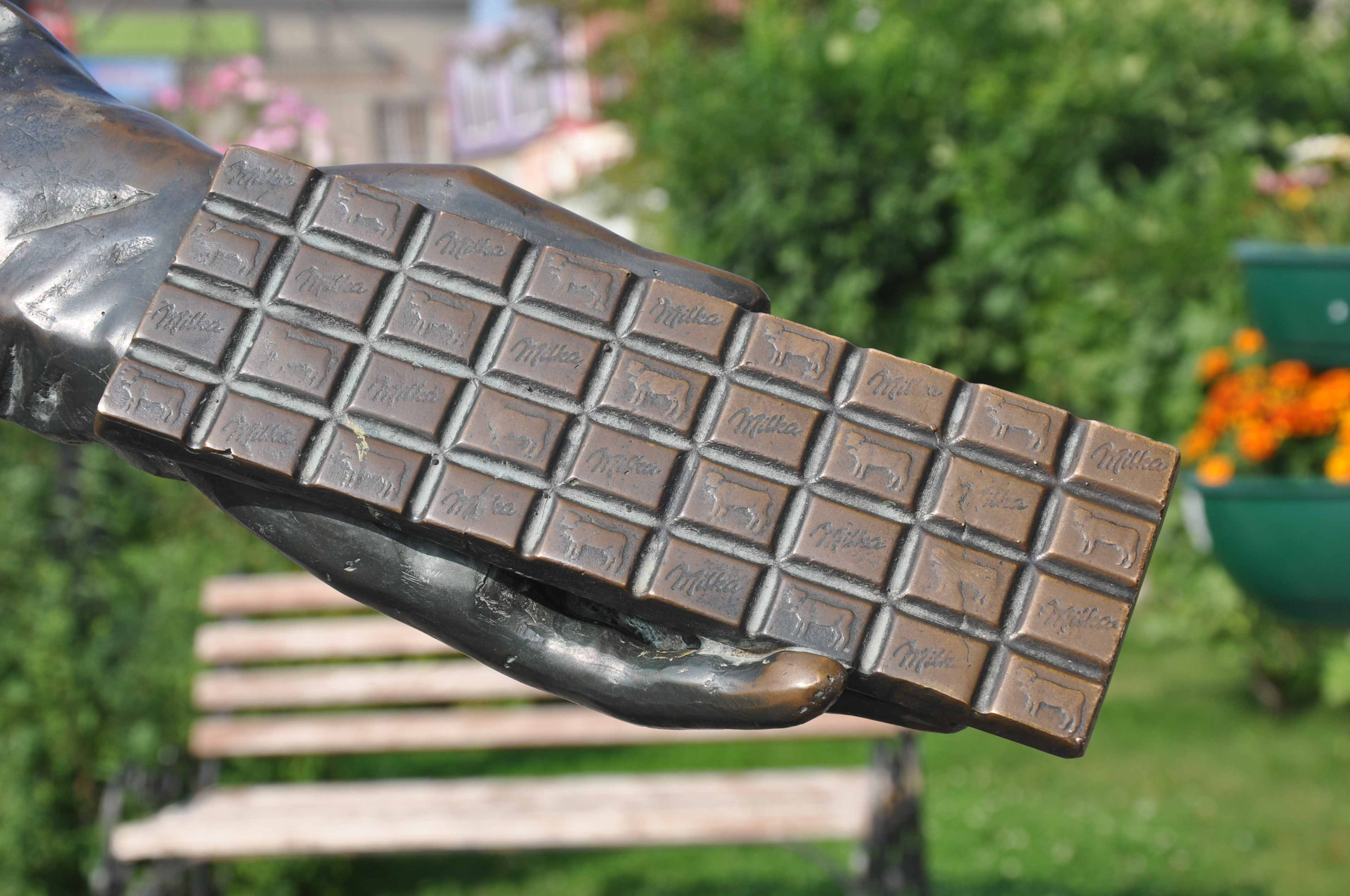 Фрагмент скульптуры «Шоколадная фея» в городе Покров Владимирской области, открытой в 2009 году.